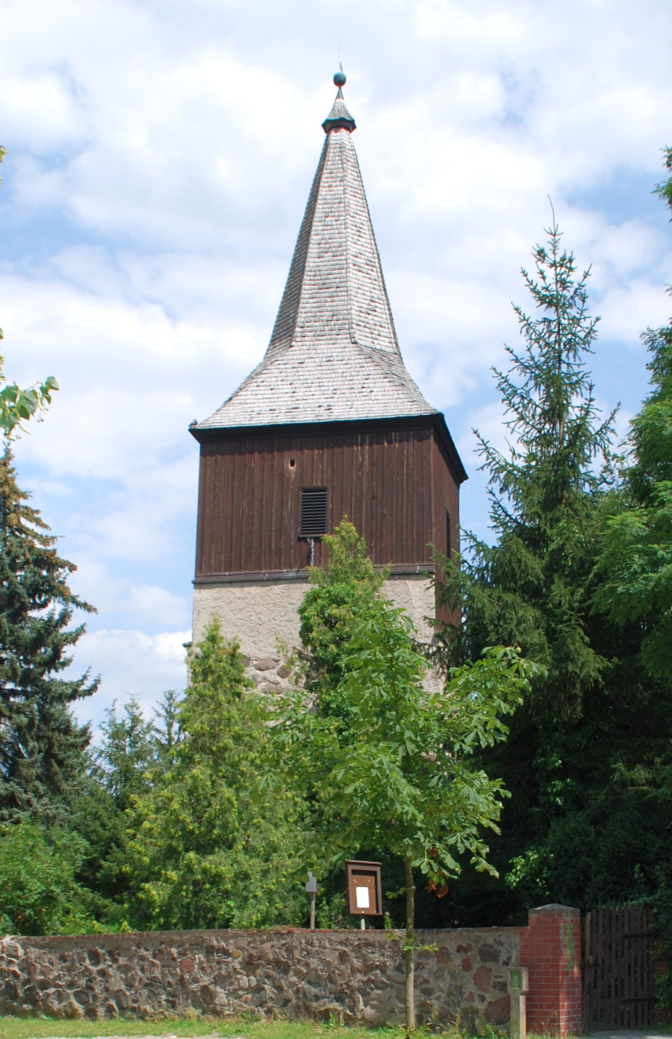 Dorfkirche Kleinschönebeck/Schöneiche bei Berlin